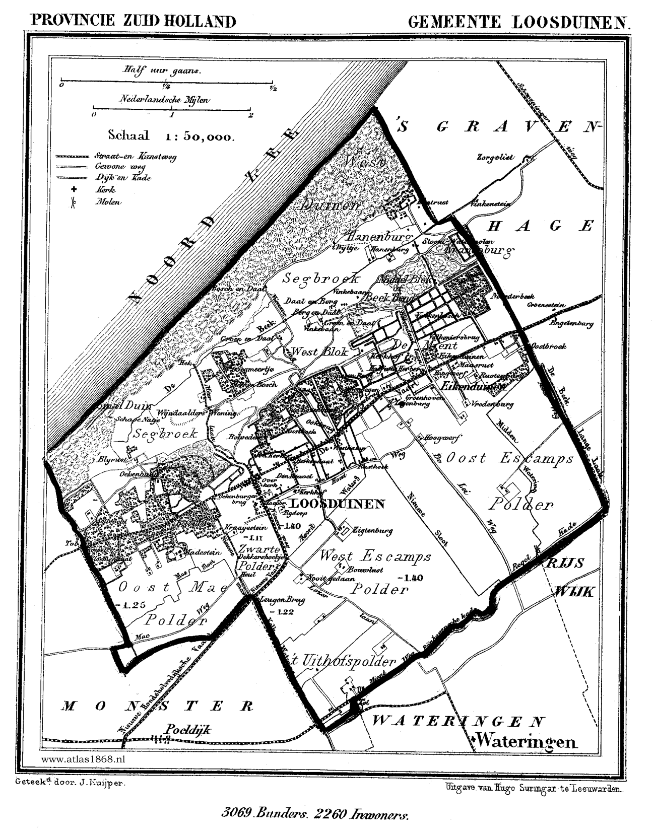 Kaart van Loosduinen uit Gemeente Atlas van Nederland, J. Kuyper 1865-1870, Uitgave Hugo Suringar Leeuwarden.